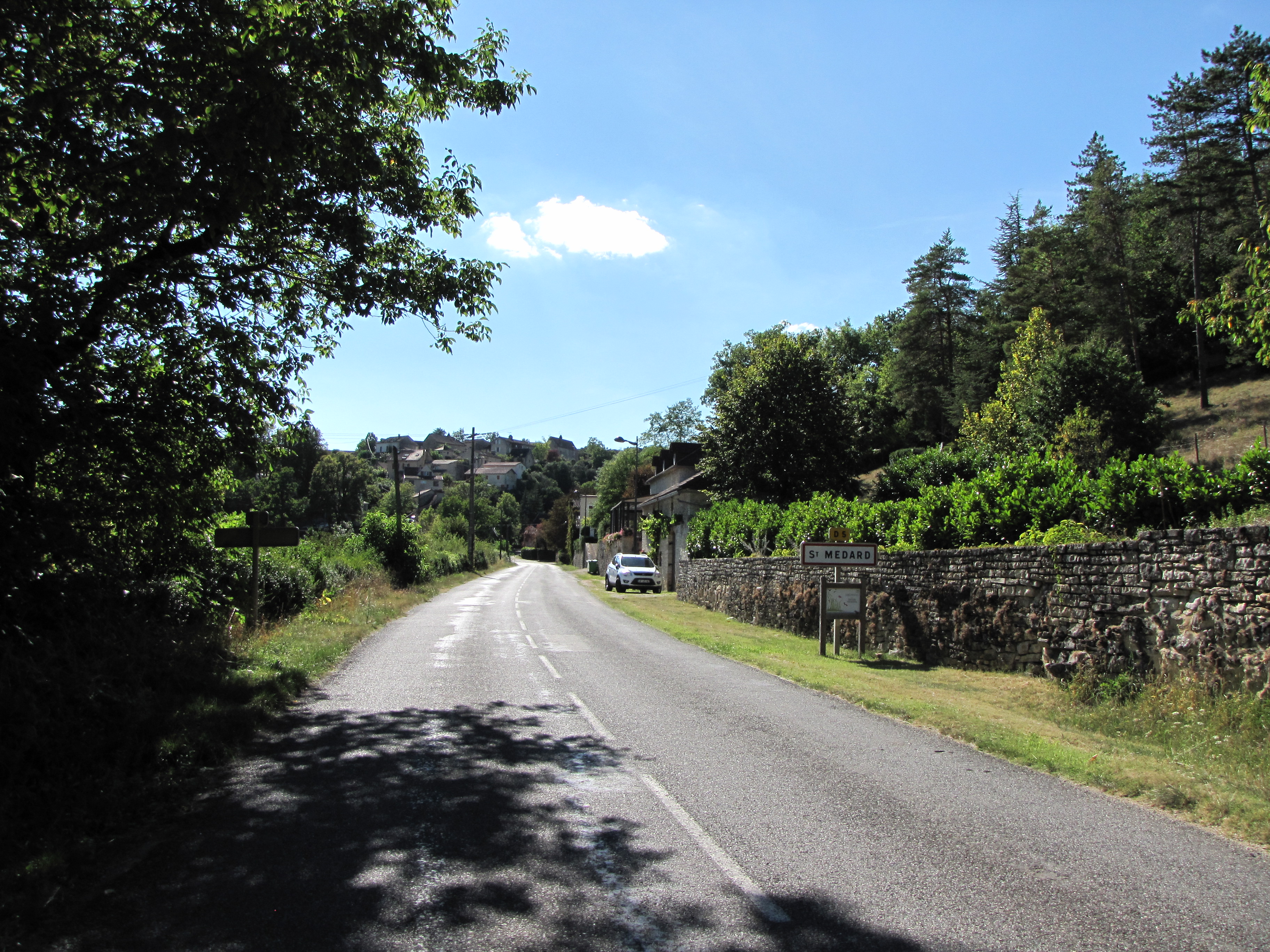 Saint-Médard (Lot)